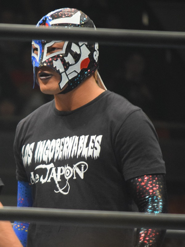 2016年2月11日 大阪府立体育会館 「THE NEW BEGINNING in OSAKA」 BUSHI